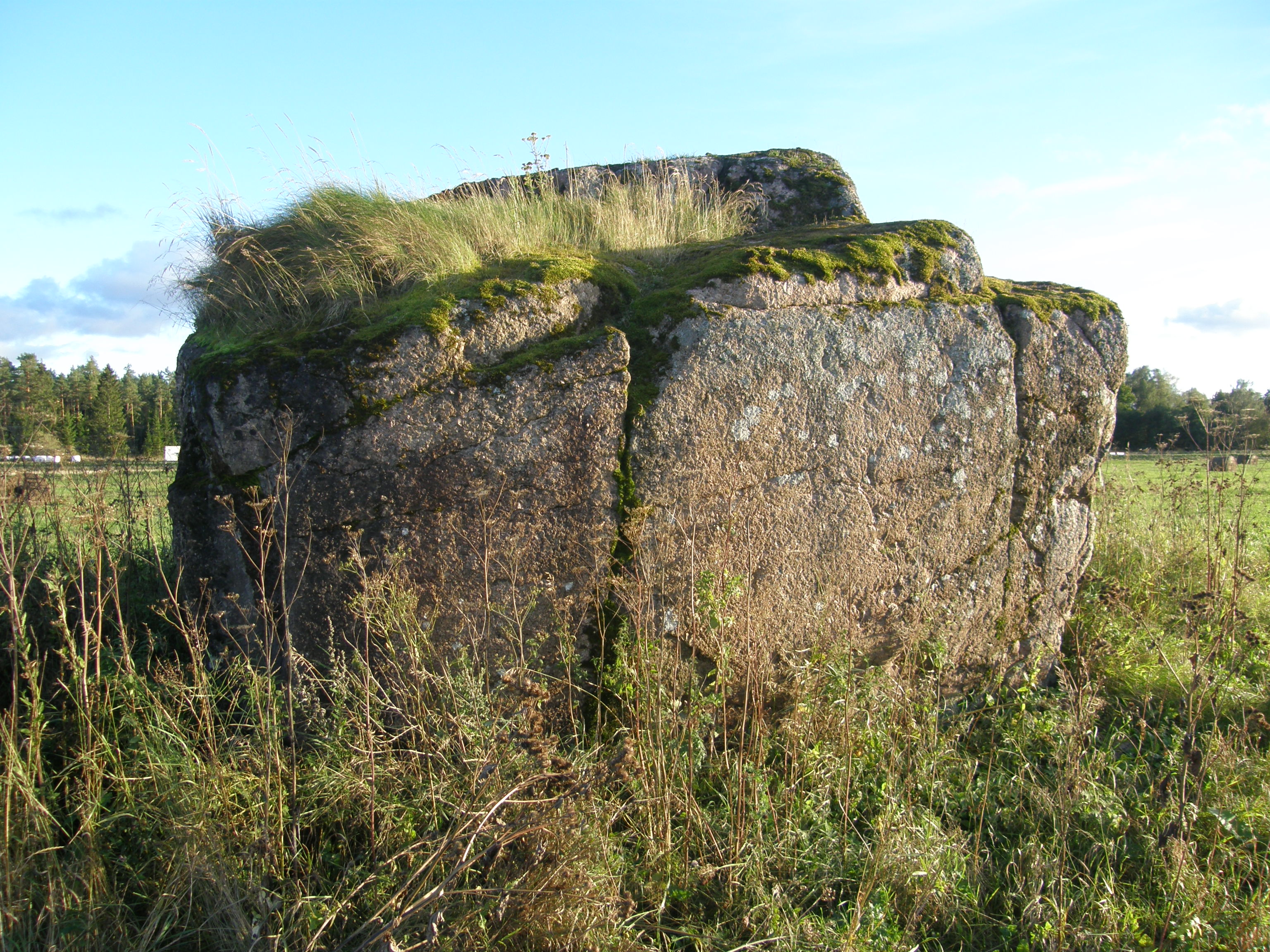 Ohvrikivi "Nõiakivi", "Rahakivi"